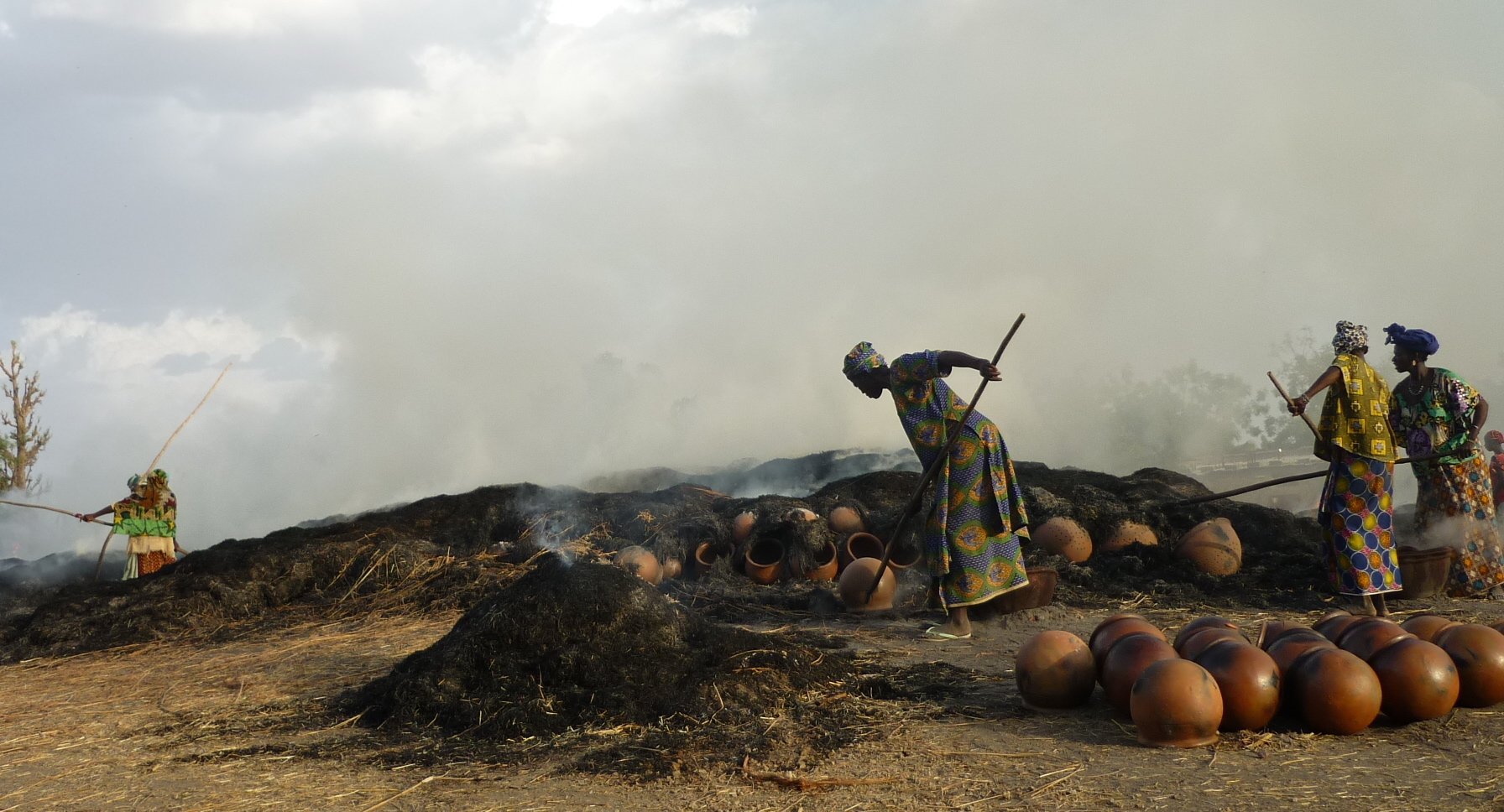 Potières effectuant la cuisson collectives hebdomadaire sur la place du village This is an image of "African people at work" from Mali